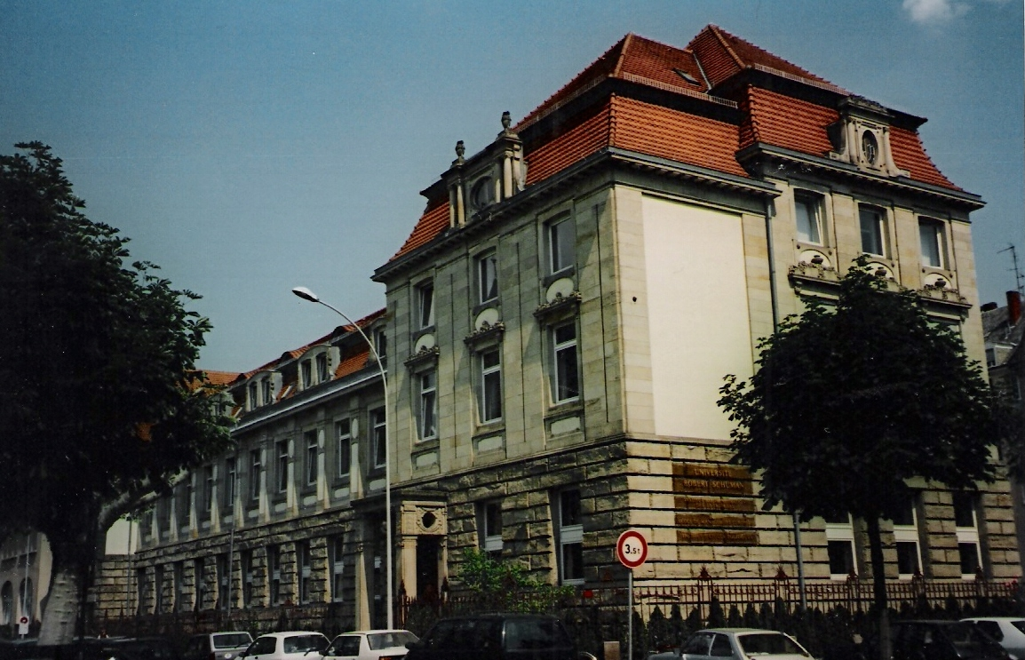 Locaux de l'Institut d'Etudes Politiques de Strasbourg Own Work 6/4/2007 Author: R-Hudit